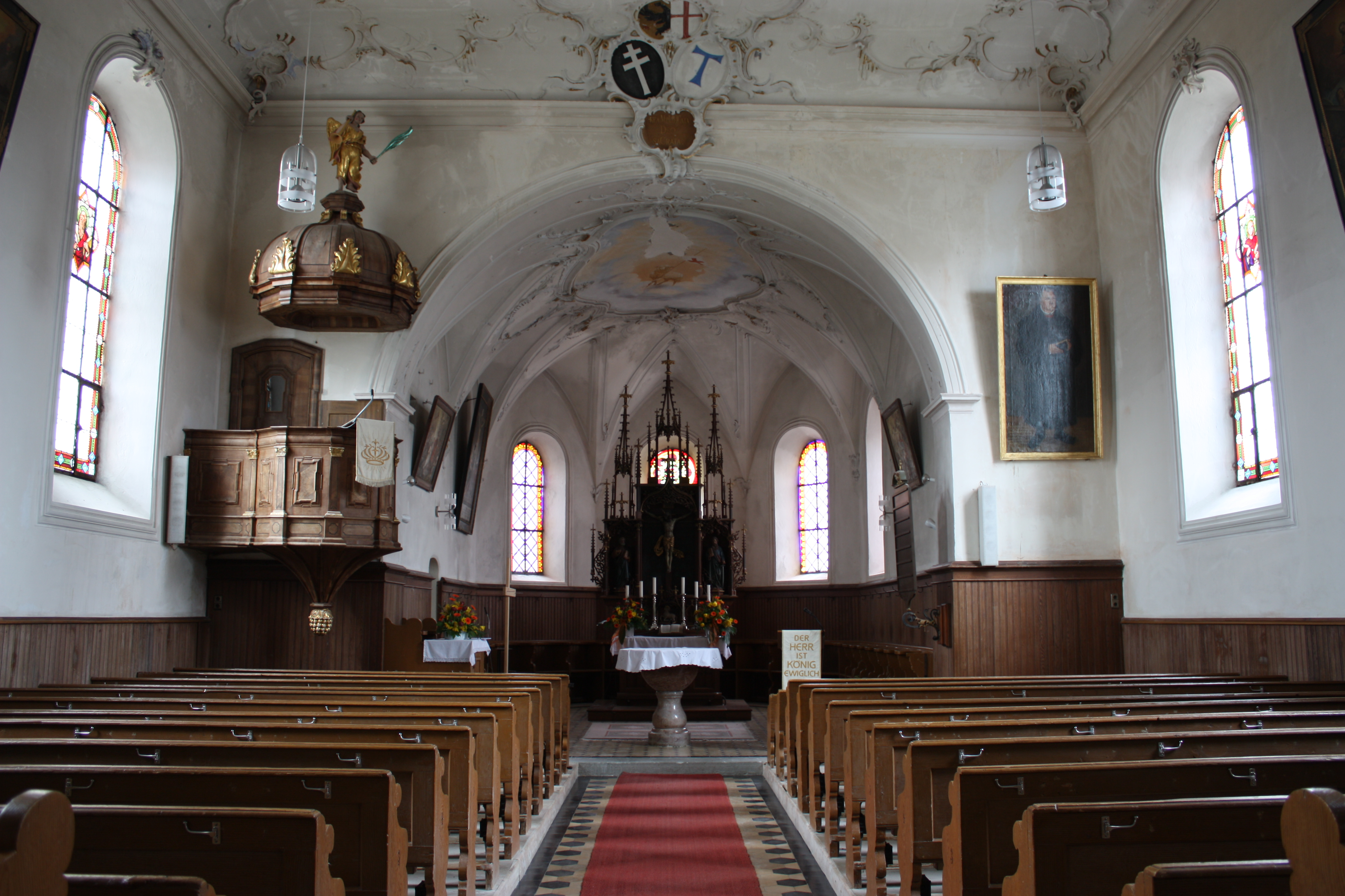 Langhaus und Chor der evangelisch-lutherischen Pfarkirche St. Agatha in Dickenreishausen. - OpenStreetMap(Info)